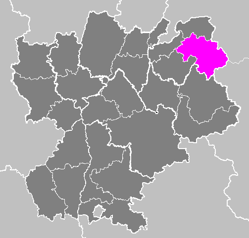 Maps of arrondissements and cantons of France: Arrondissement de Bonneville.PNG (Région Rhône-Alpes)